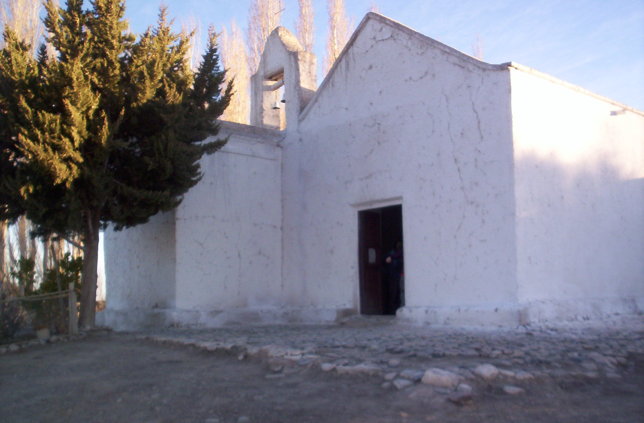 Vista de antigua Iglesia de Achango, departamento Iglesia, provincia de San Juan, Argentina